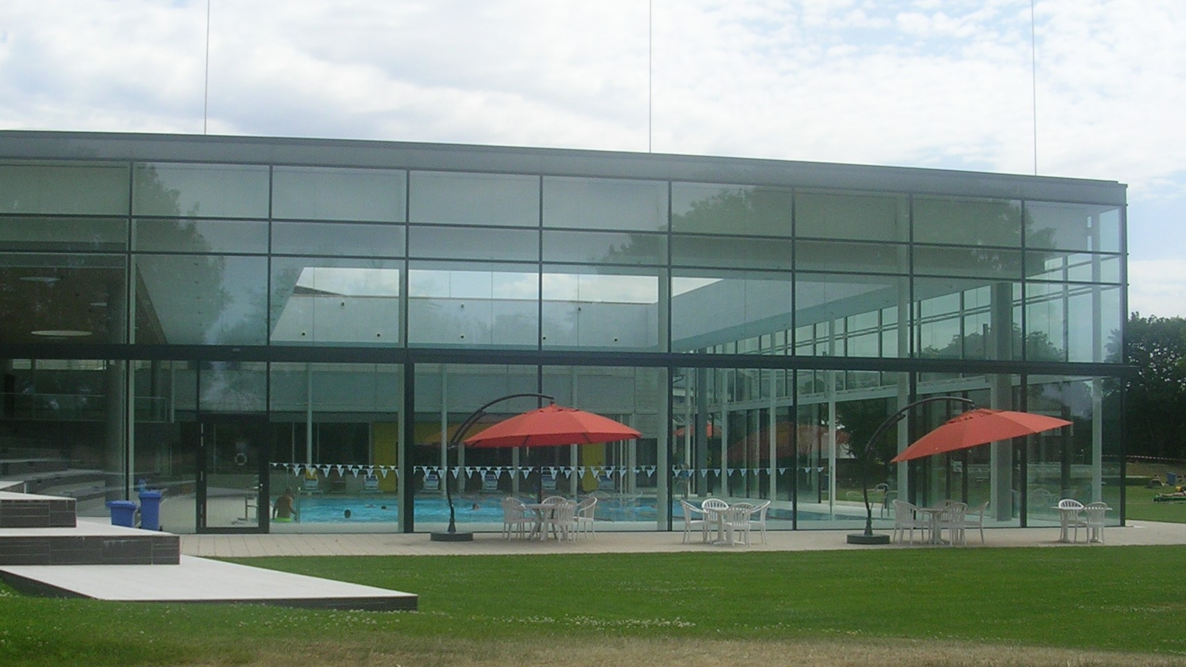 Außenansicht des 25m-Cabriobecken im Fächerbad